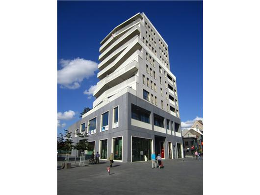 Sint-Janstoren Veemarkt Kortrijk Robbrecht & Daem